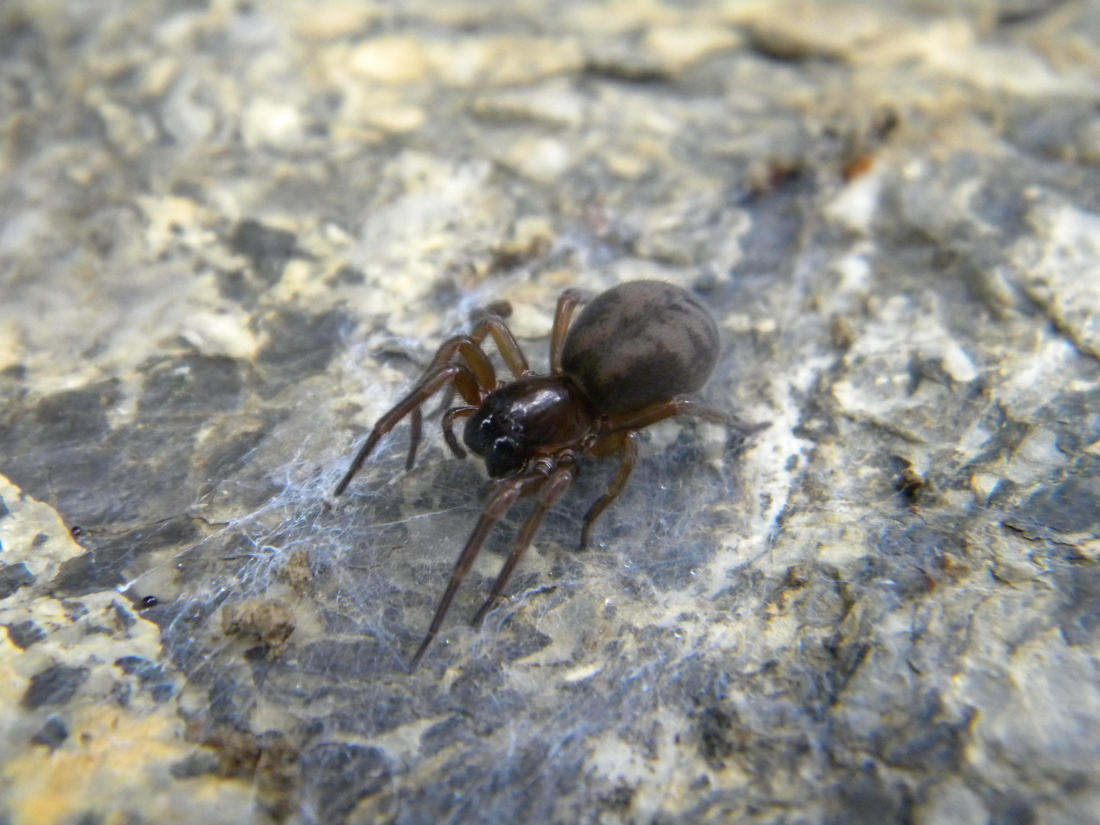 Amaurobius fenestralis Slovenia